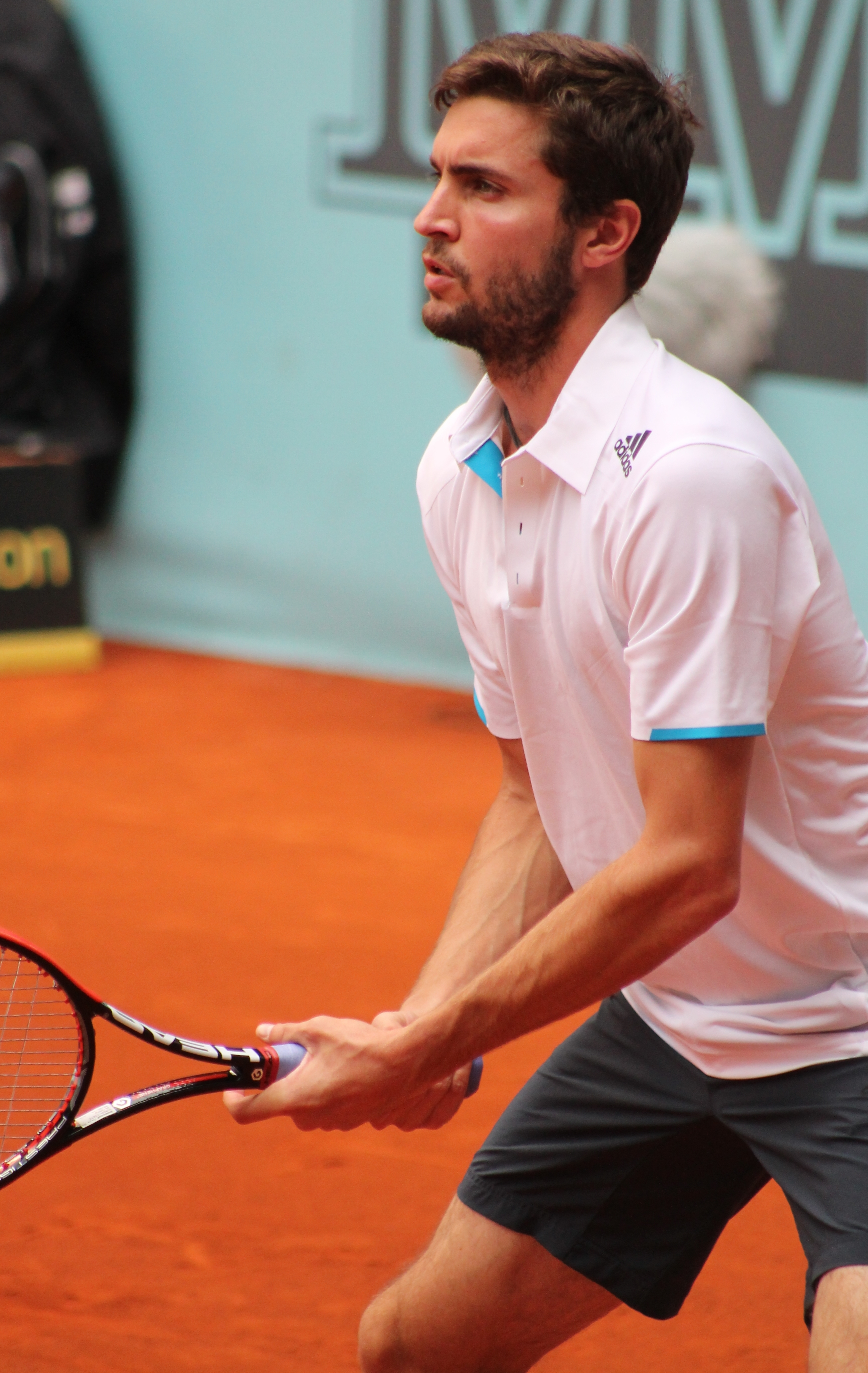 Simon MA14 (19)